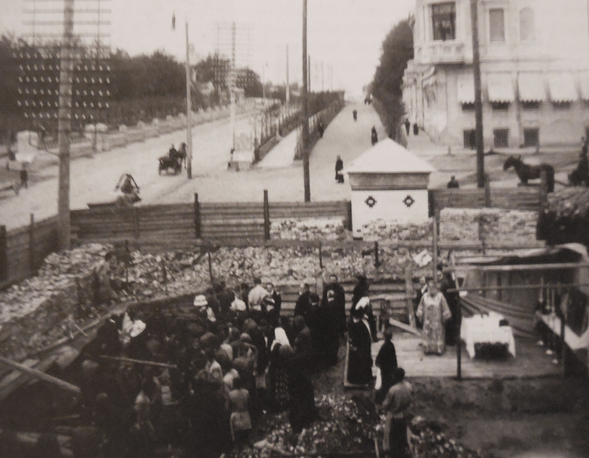 Стройплощадка музея, Иваново